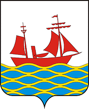 Герб Поронайска Сахалинской области